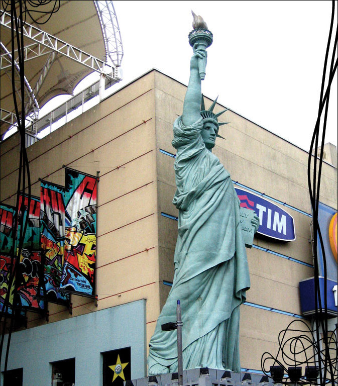 Barra.Estado do Rio